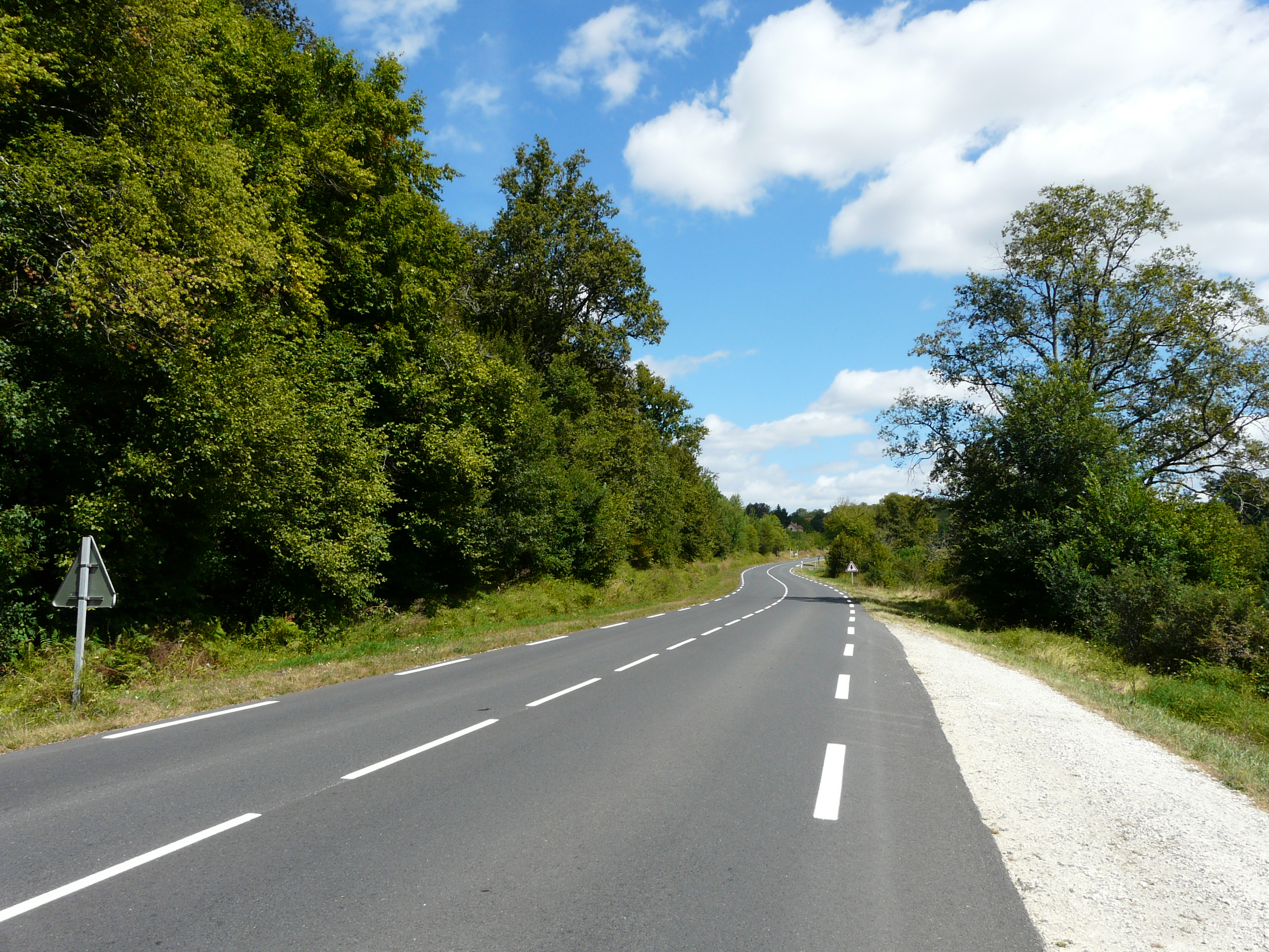 La route départementale 707 à Saint-Romain-et-Saint-Clément, Dordogne, France.